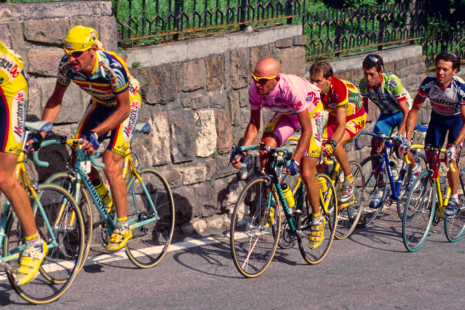 Marco Pantani - Giro d'Italia